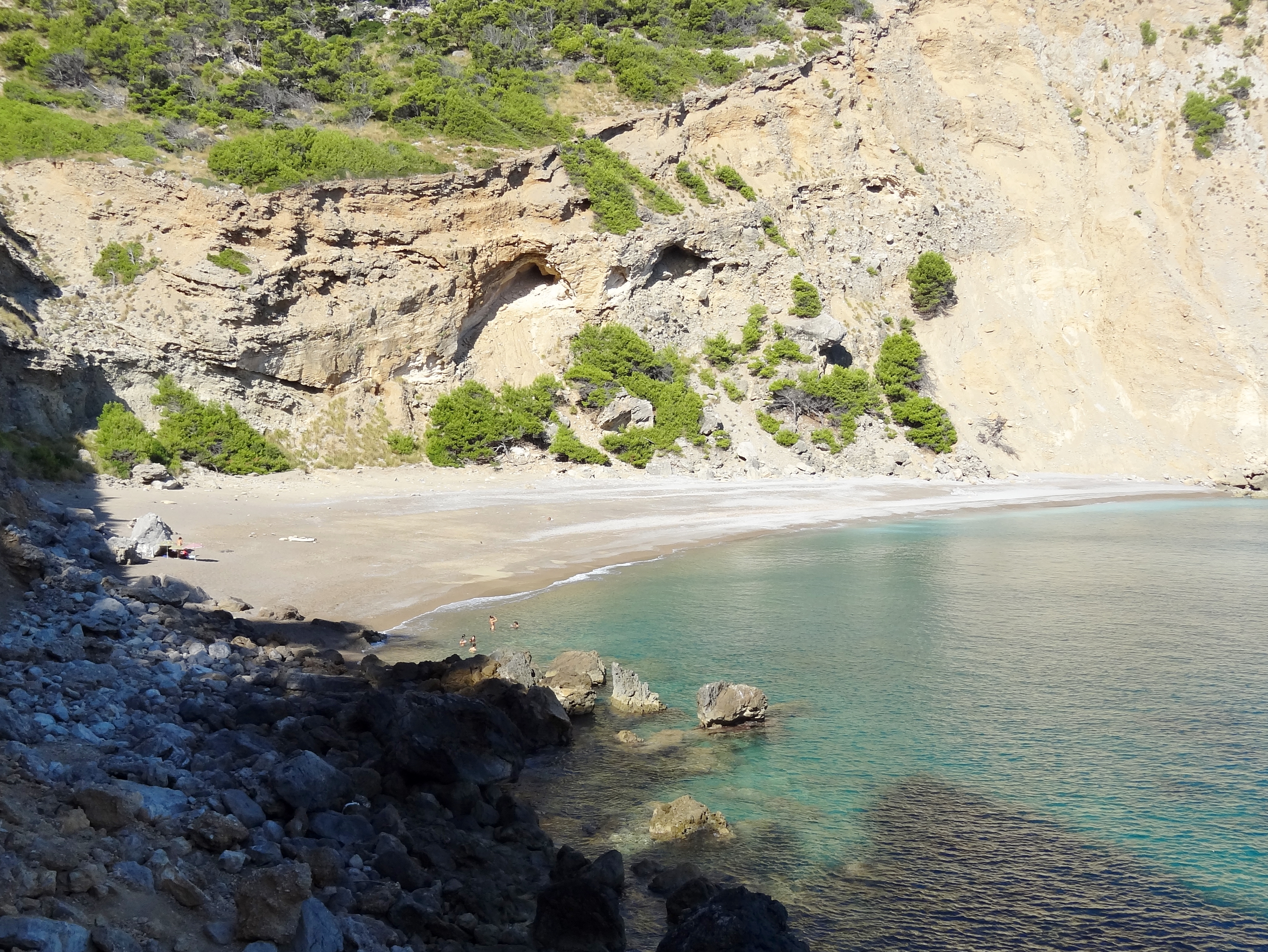 Platja des Coll Baix, Strand auf der Halbinsel Victòria in der Gemeinde Alcúdia, Mallorca, Spanien